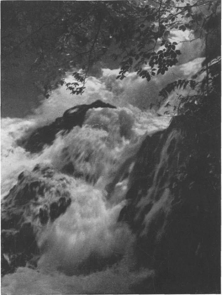 Hudournik Kropa v Bohinju.